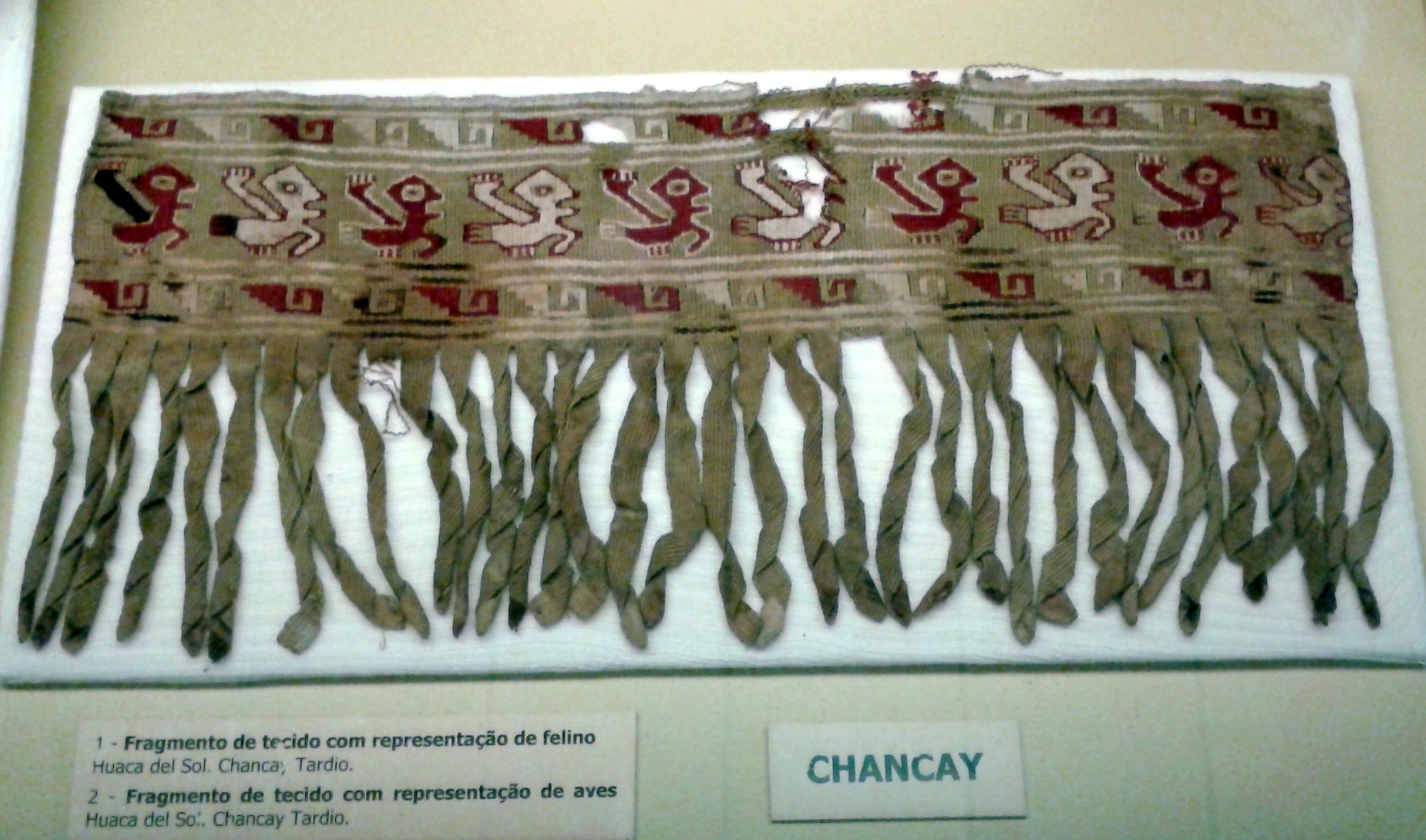 Fragmento de tecido com representação de aves. Huaca del Sol, Chancay Tardio. Acervo de arqueologia pré-colombiana do Museu Nacional/UFRJ - Rio de Janeiro, Brasil.